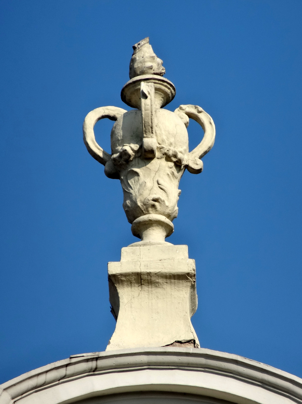 Kamienica przy ul. Gdańskiej 119 w Bydgoszczy, zbud. w 1896 r. wg proj. Fritza Weidnera